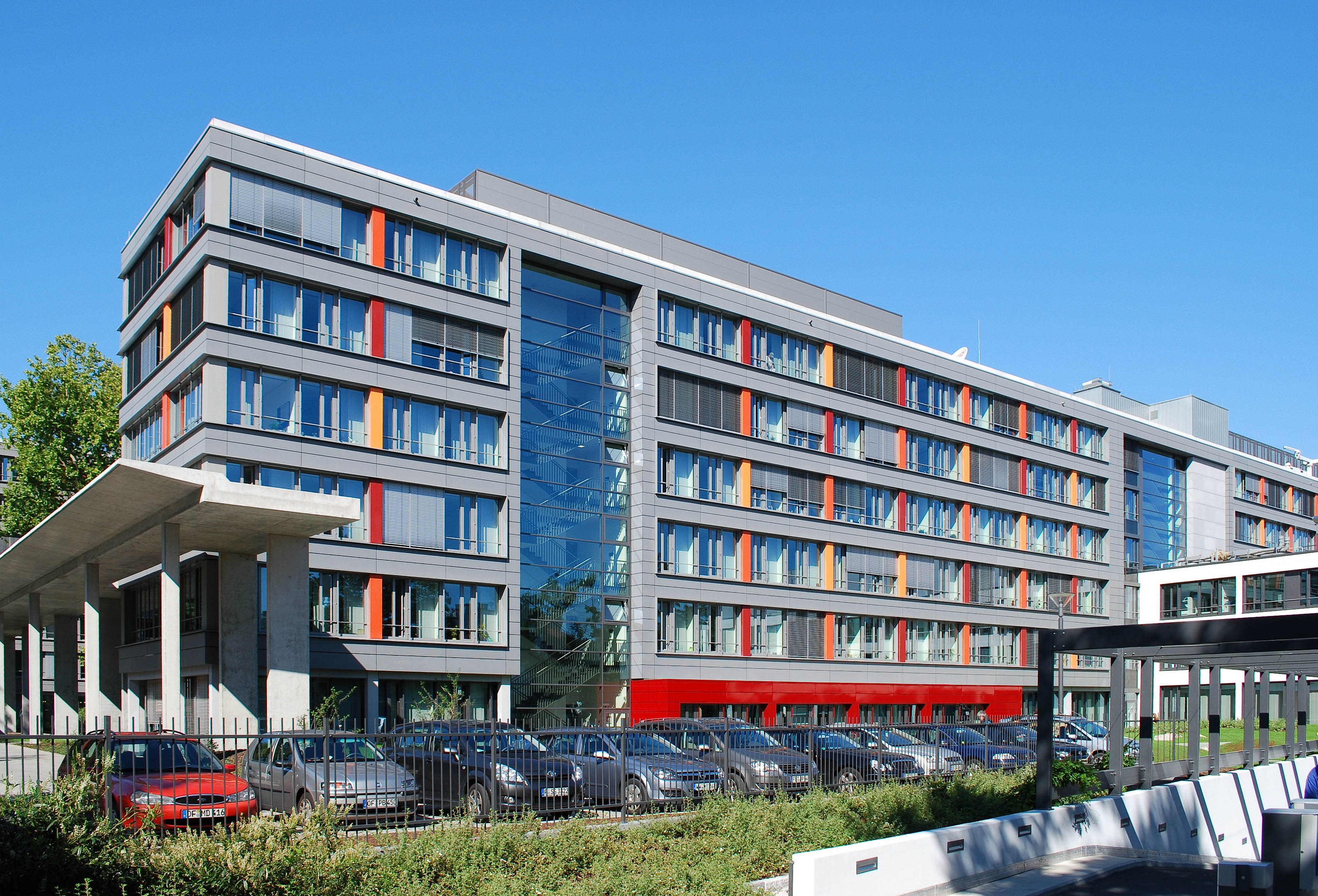 Die Zentrale des Deutschen Wetterdienstes in Offenbach am Main.